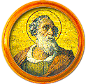 Médaillon de la frise des papes à Saint-Paul-hors-les-Murs. Il s'agit d'une mosaïque représentant de Zéphyrin, 15e pape de l'Église catholique (198-217 ou 218).